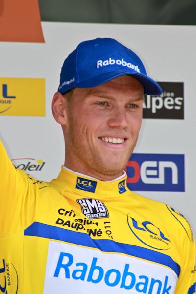 Prologue du Critérium du Dauphiné 2011, Saint Jean de Maurienne